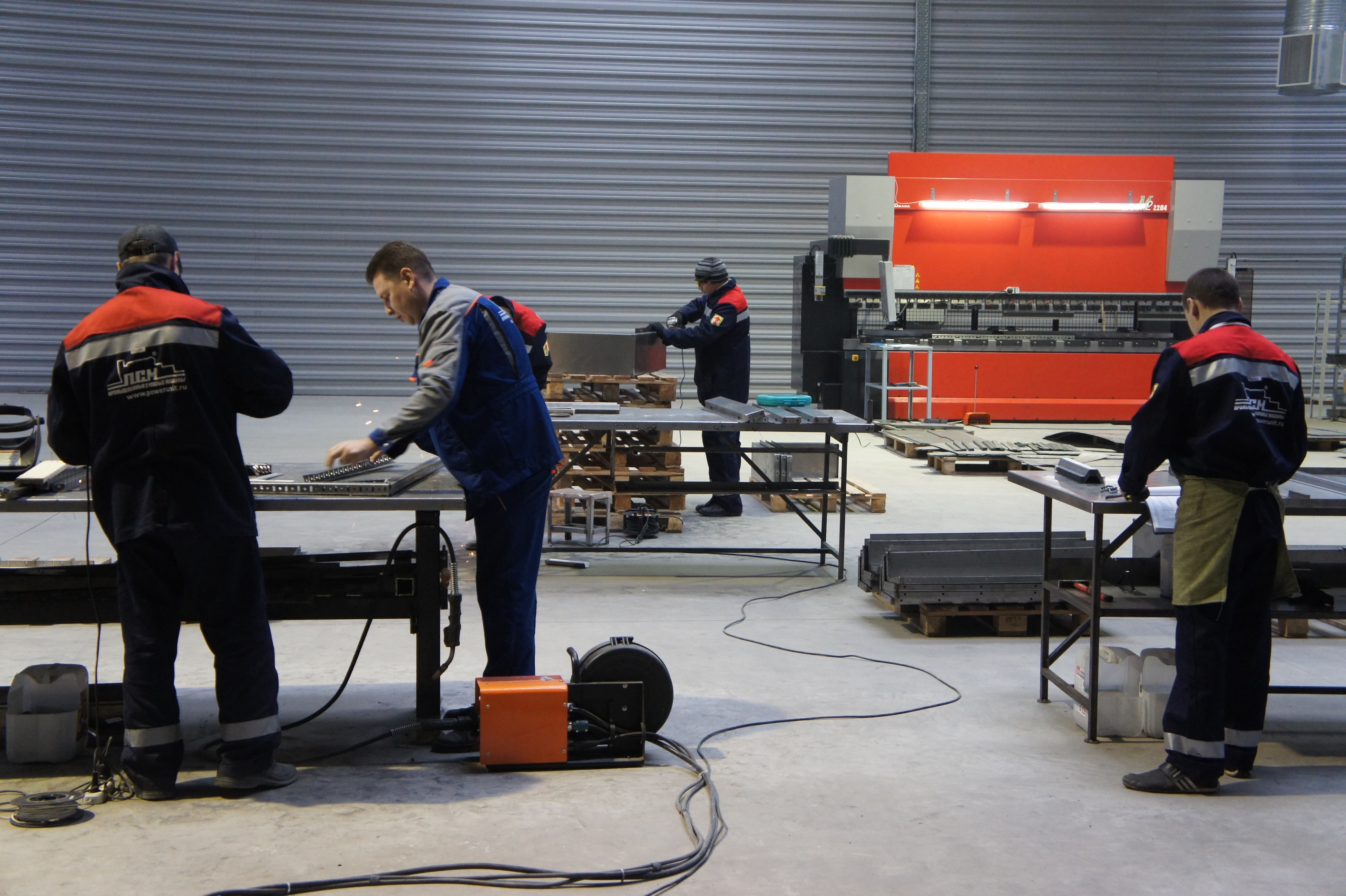 город Тутаев, технопар "Мастер", Ярославская область